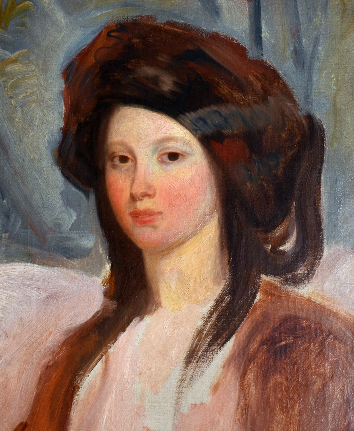 Actress Juliette Drouet as princesse Negroni (ca. 1827) [1].